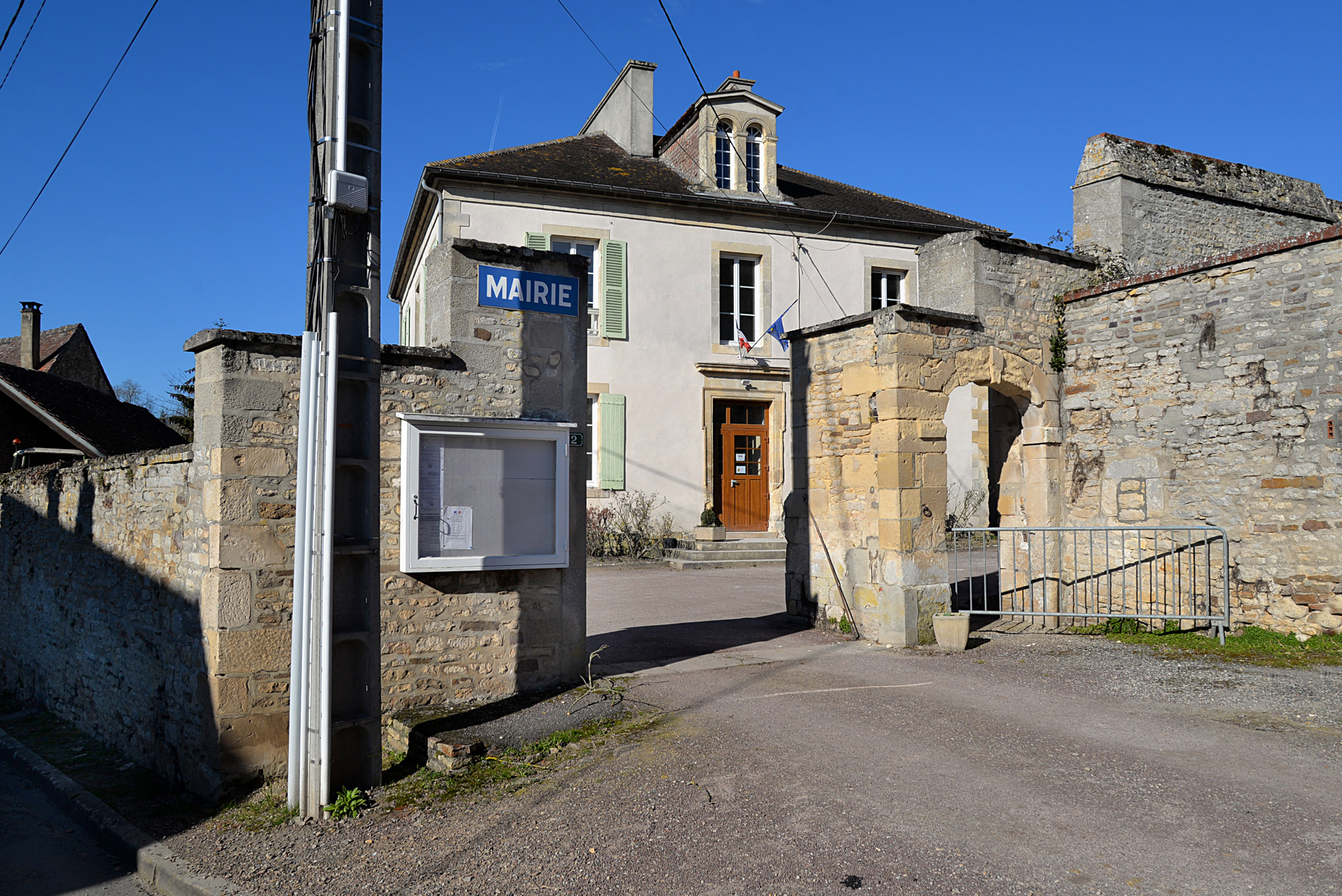 Ouilly-le-Tesson (14)